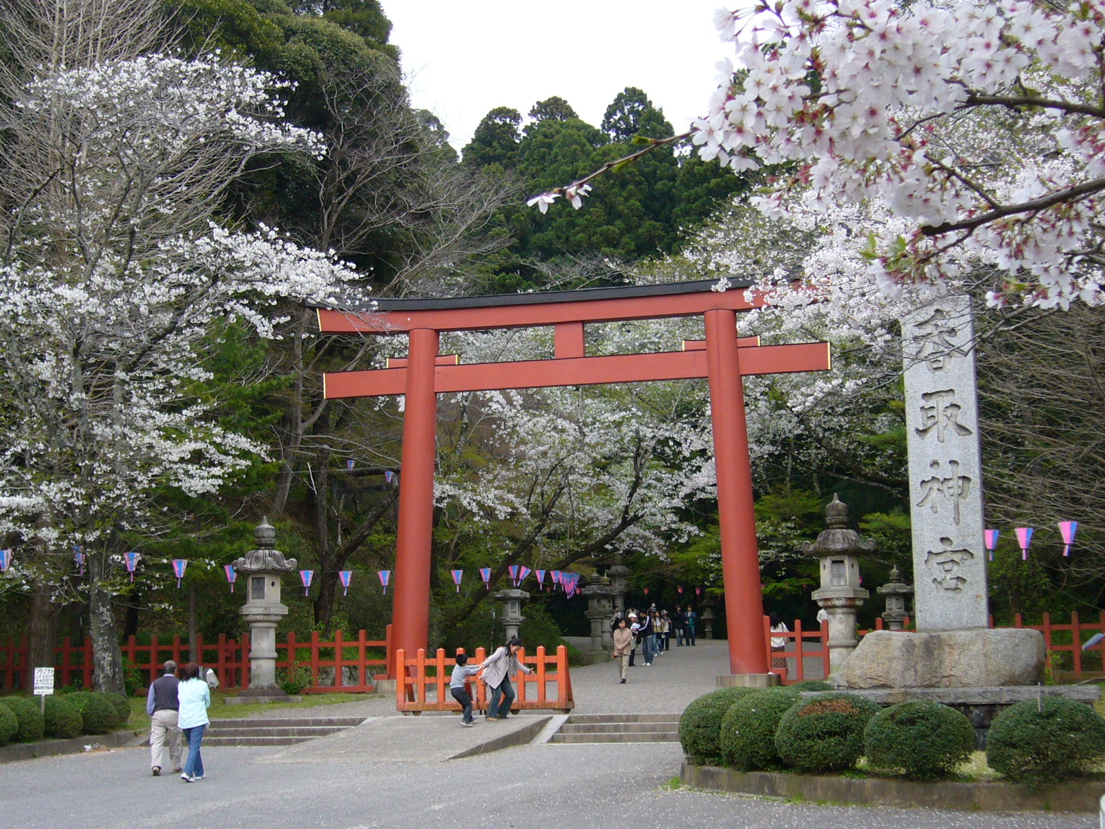 skatori-jinngu-shrine torii,katori-city,japan